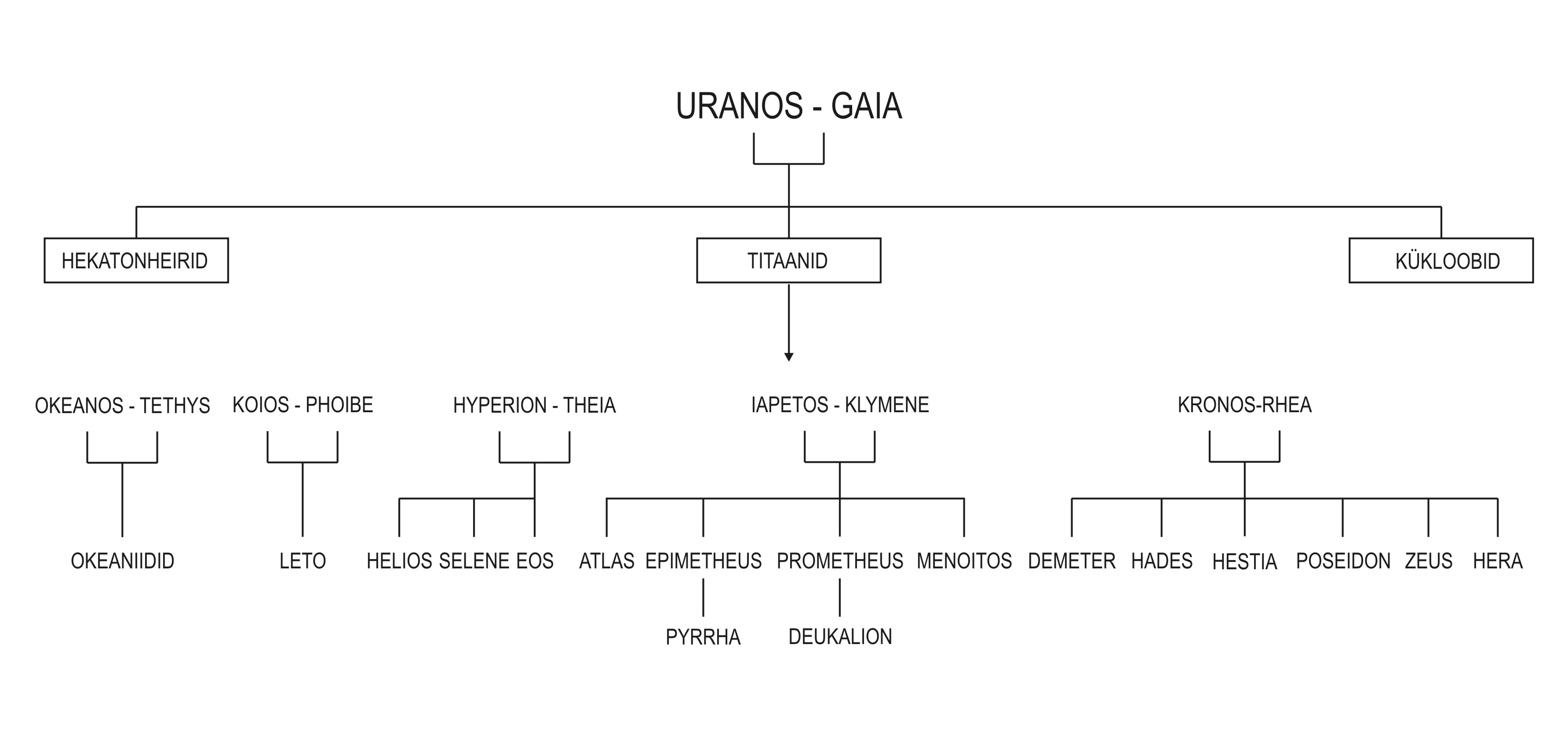 Uranose ja Gaia järglased